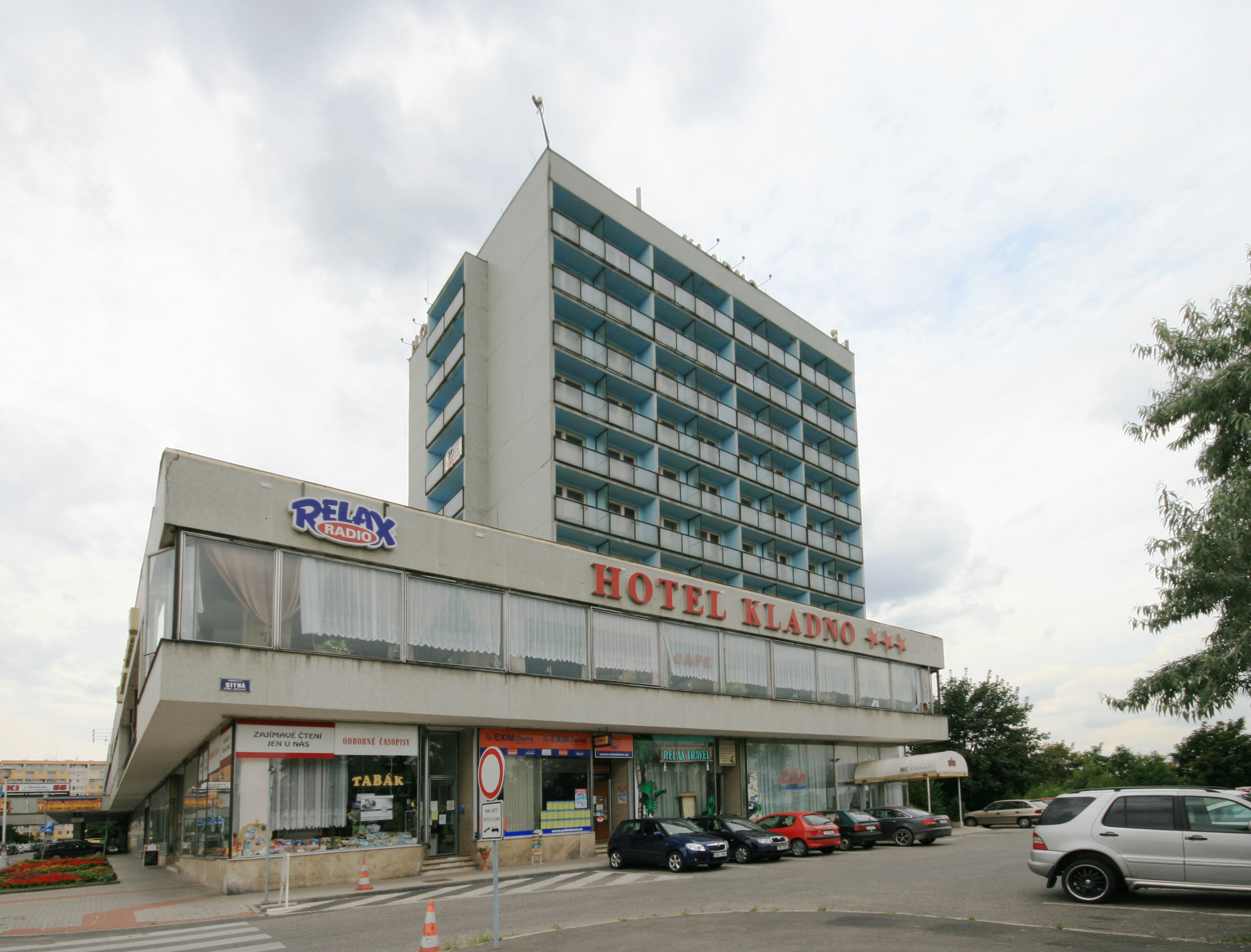 Foto hotelu z náměstí Sítná